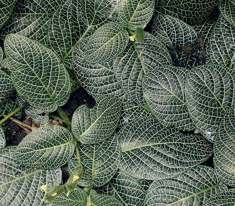 Fittonia_albivenis